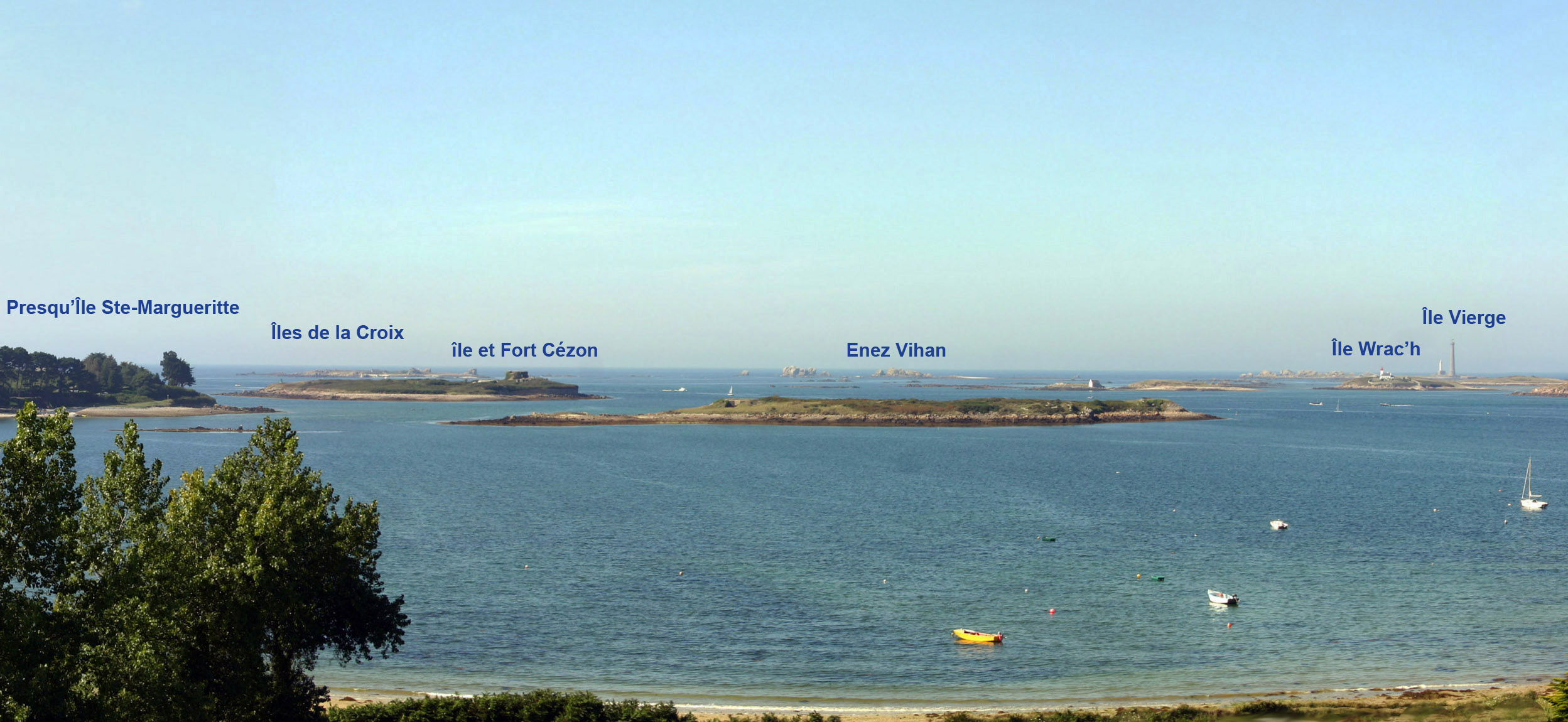 Panorama des ïles de l'Aber Wrac'h-Finstère-Bretagne-France